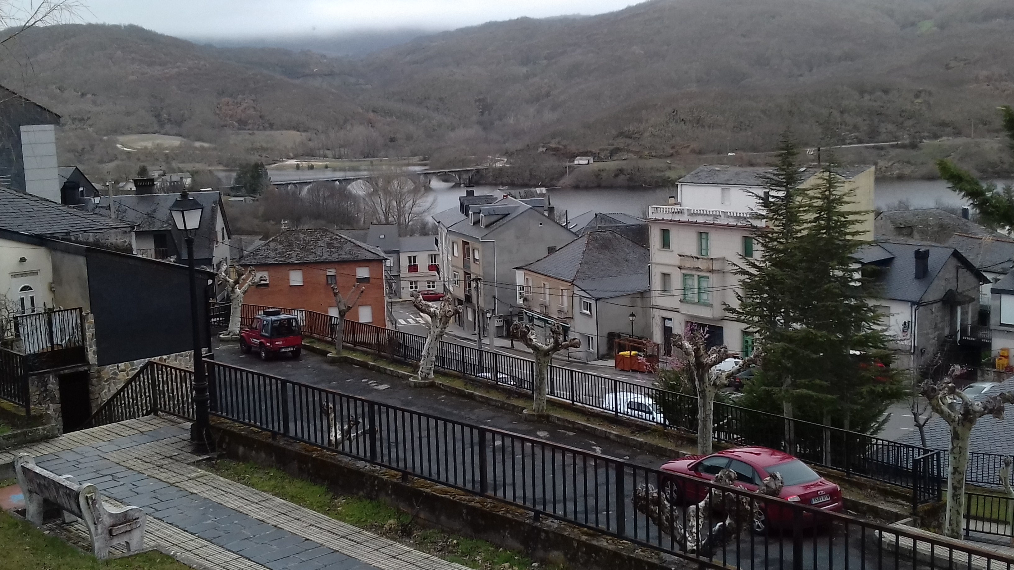 Vista xeral da Veiga, coa ponte sobre o encoro de Prada, no río Xares